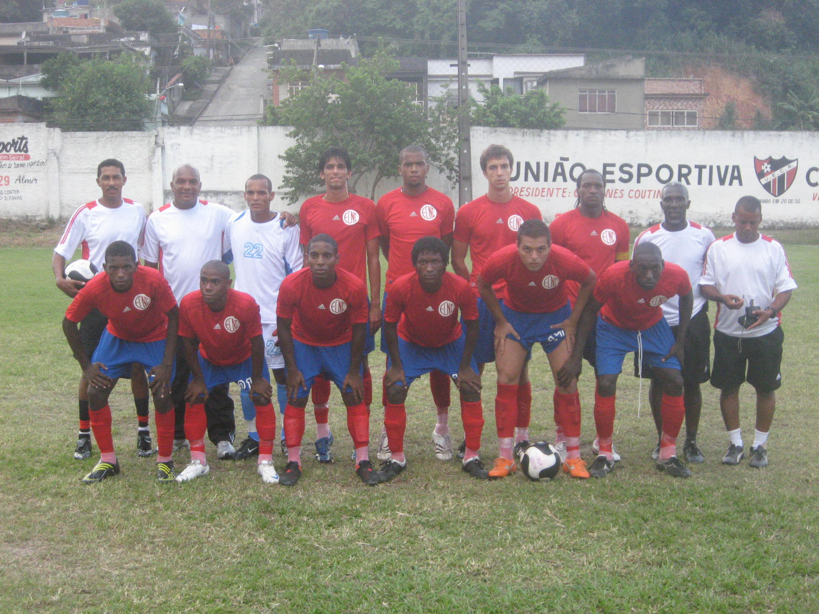 Equipe profissional do EC Nova Cidade em 2010.